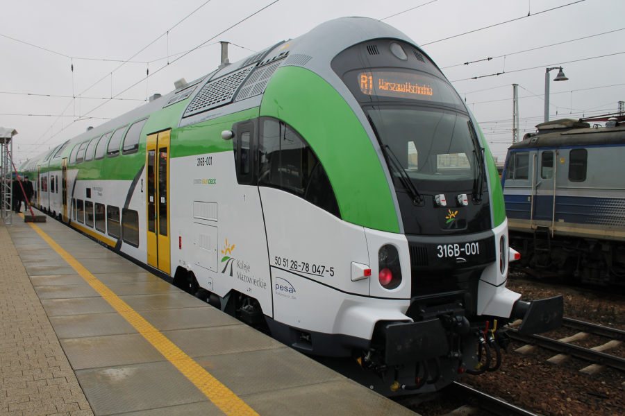 Piętrowy wagon sterowniczy Pesa Sundeck 316B-001 stoi przy peronie 5 stacji Warszawa Wschodnia podczas uroczystego przekazania Kolejom Mazowieckim pociągów push-pull wyprodukowanych przez Pesę Bydgoszcz.